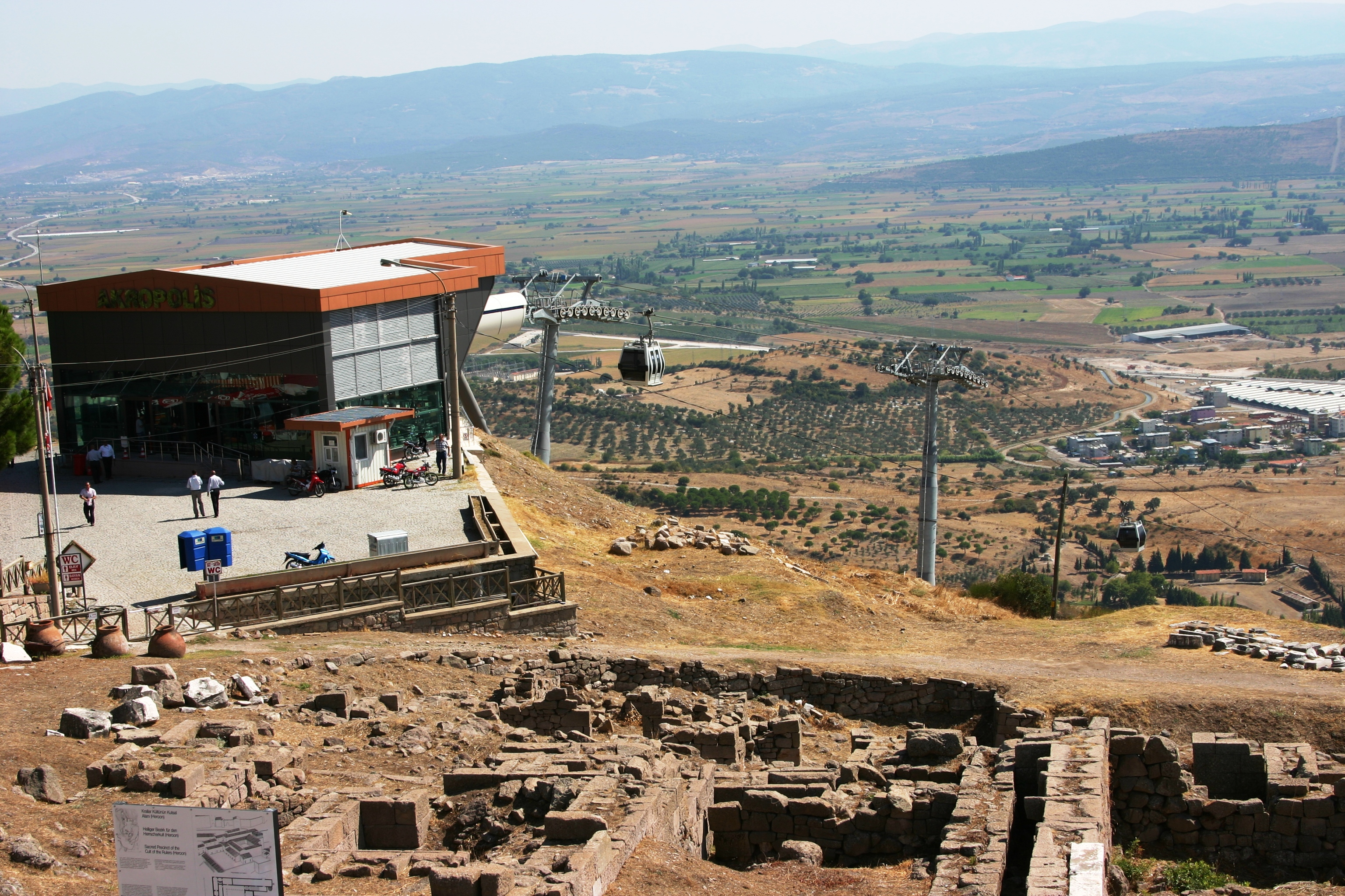 Entrada do complexo com as ruínas da Acrópole de Pérgamo